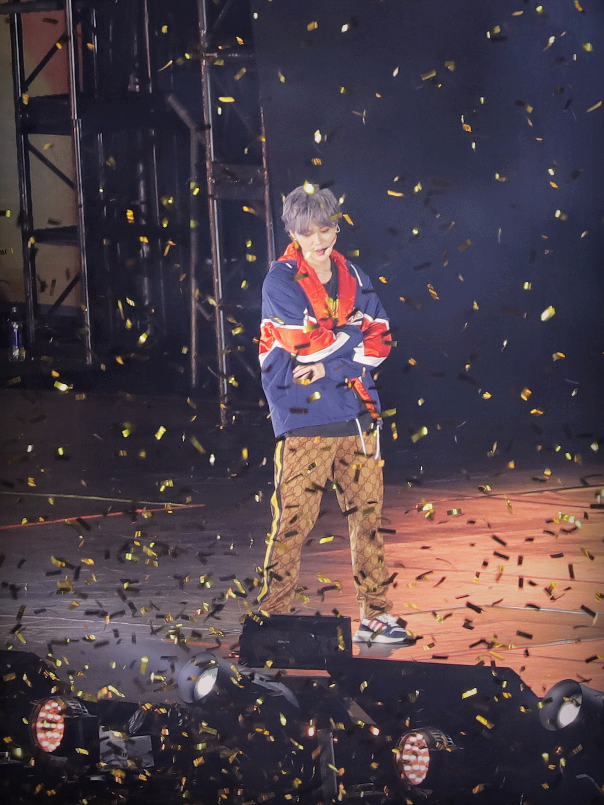 鹿晗杭州演唱会